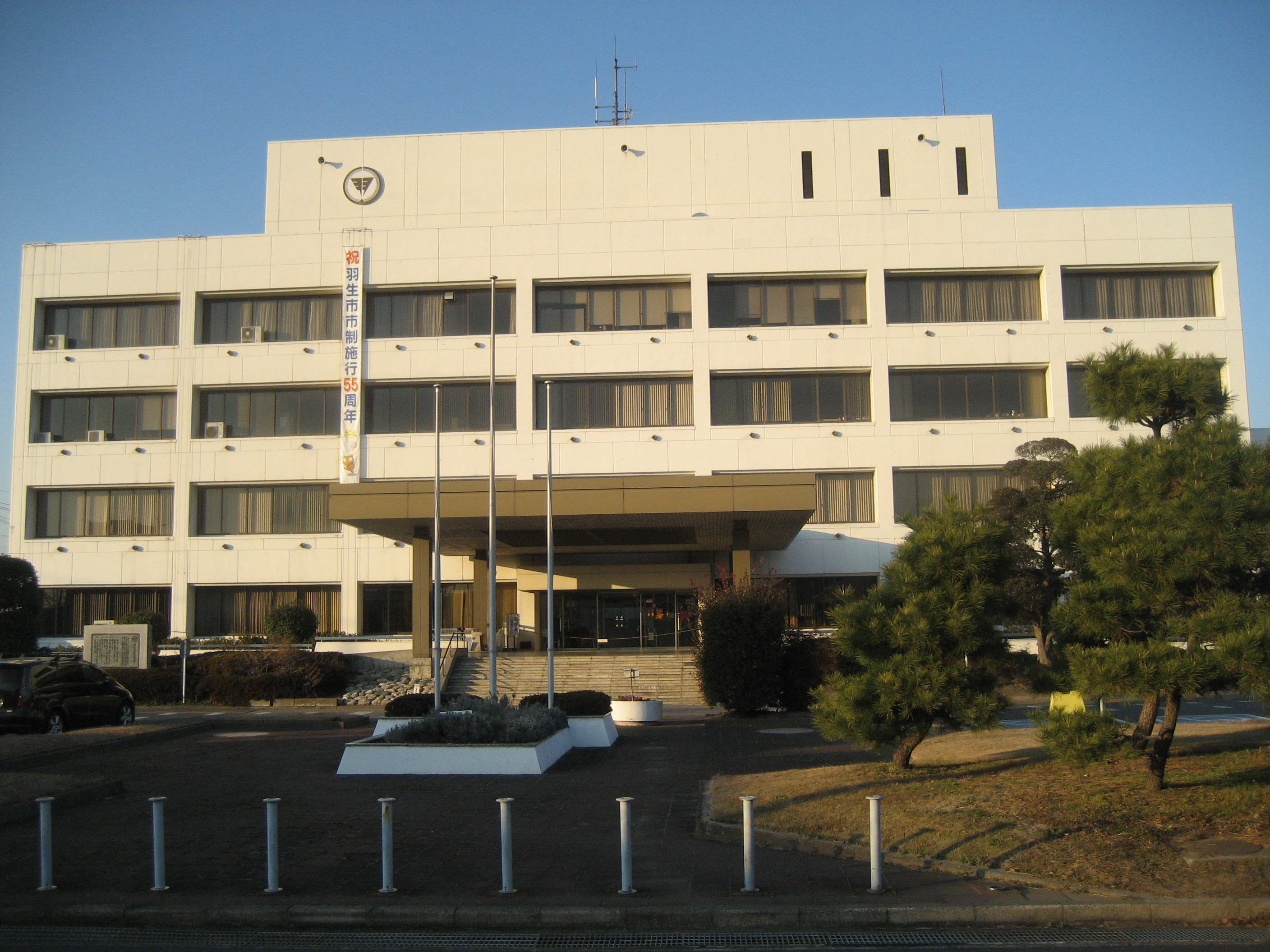 埼玉県羽生市役所庁舎